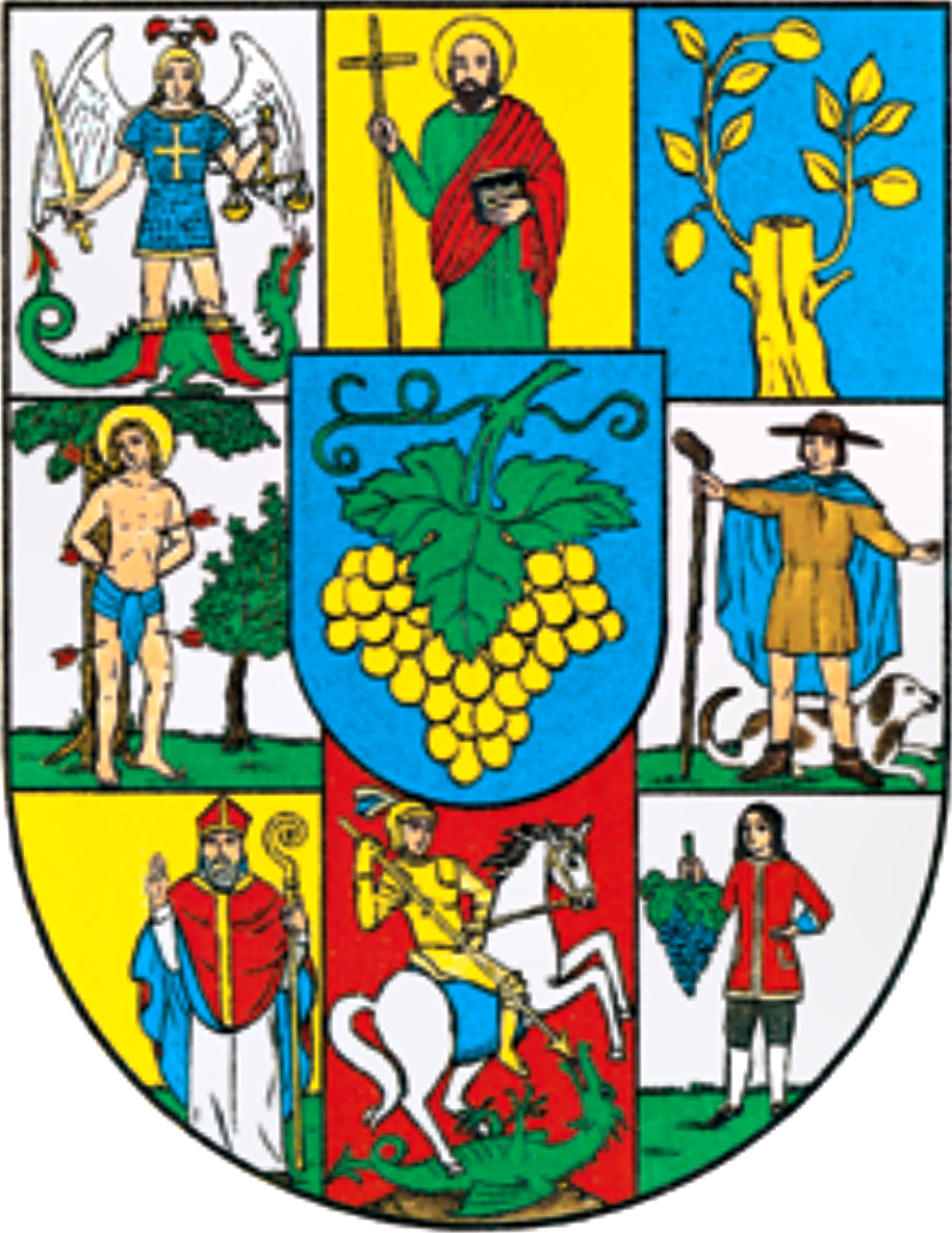 Wappen des 19. Wiener Gemeindebezirks Döbling